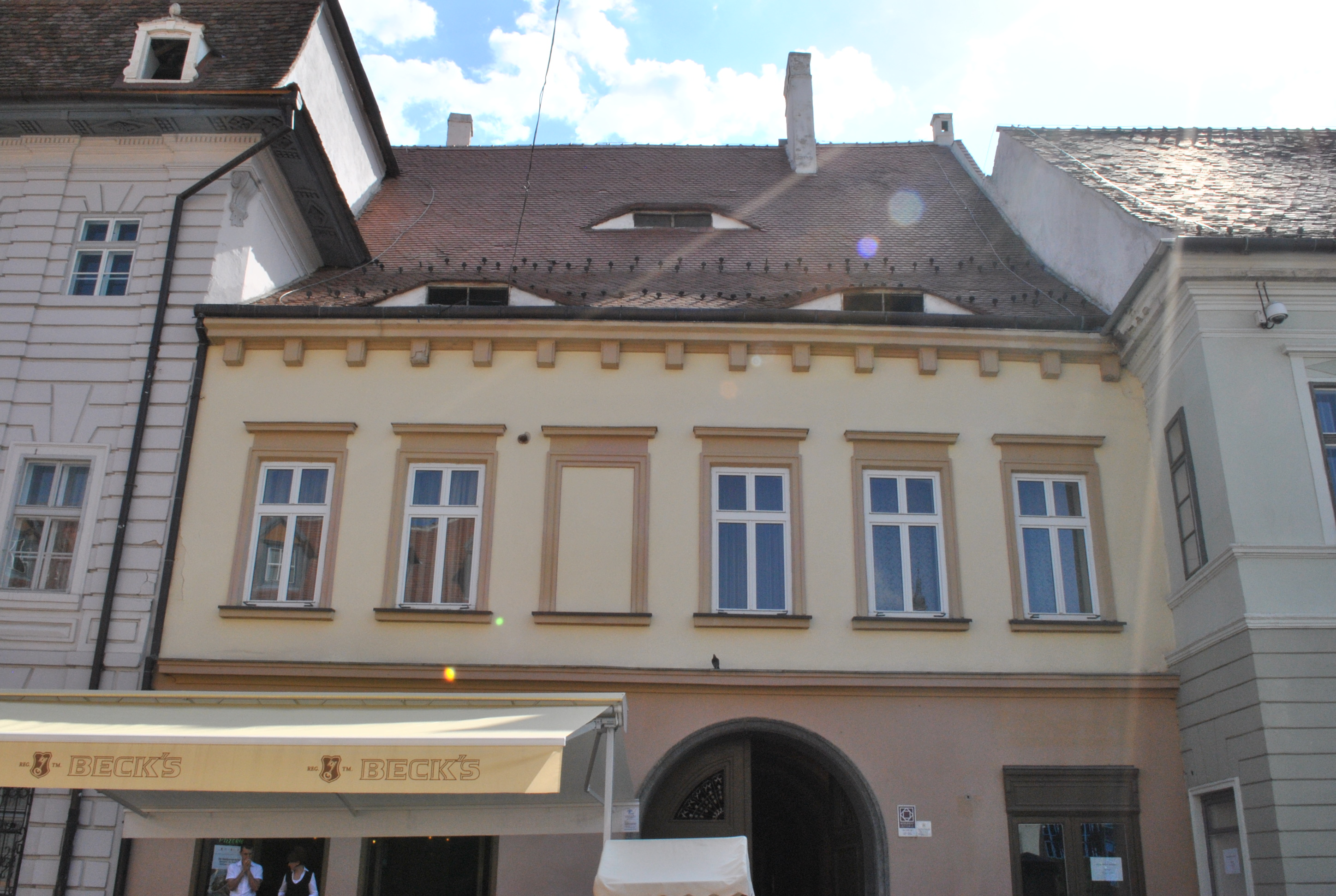 Casă, sec. XVIII,1885 - 1899